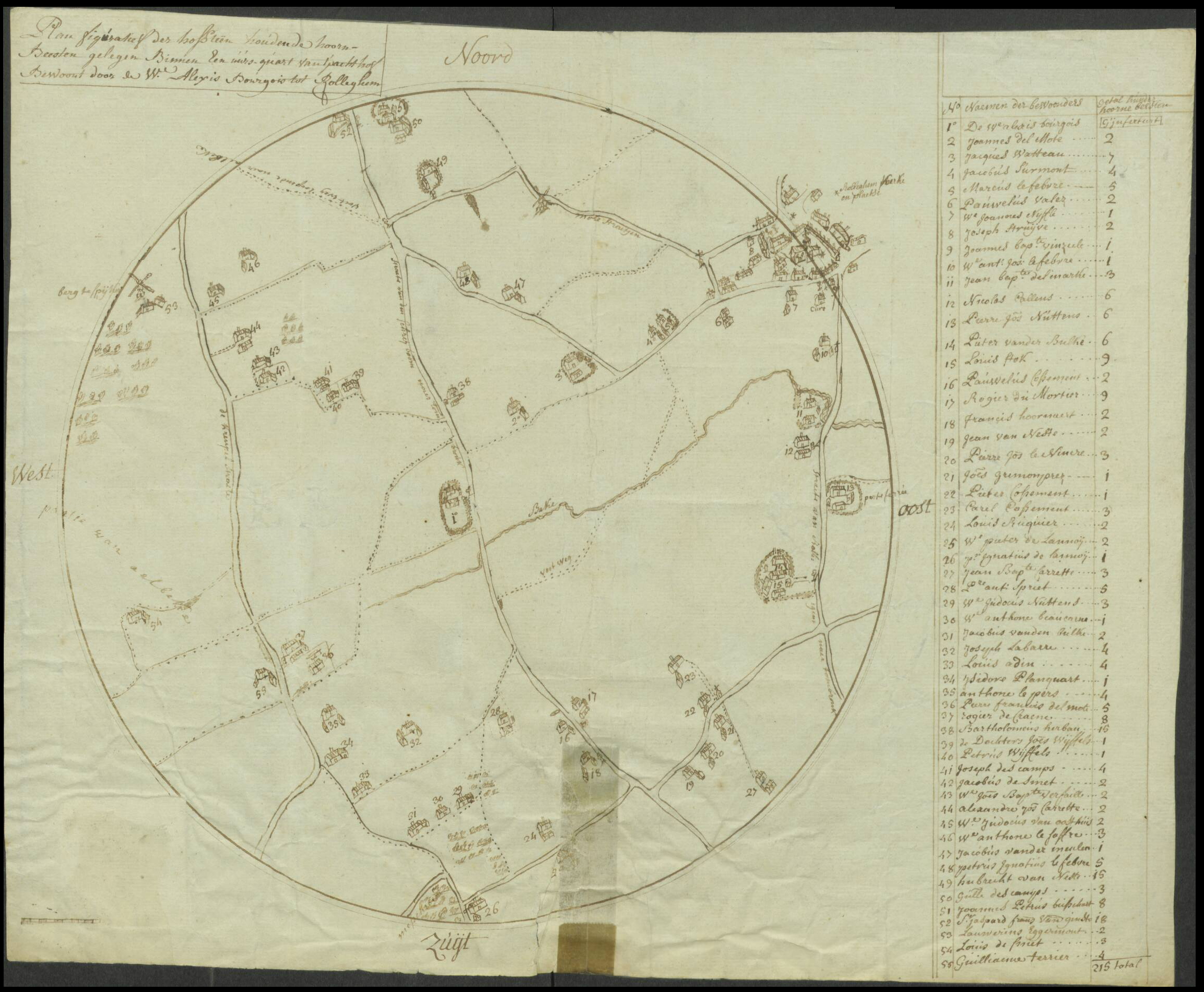 Rollegem (Courtrai-Belgique) - Carte de 1774 présentant l'emplacement de fermes avec bovins avec noms des habitants. Carte établie pour la lutte contre la peste bovine. Dimensions : 30 x 38 cm. Source : Archives de l'État en Belgique.